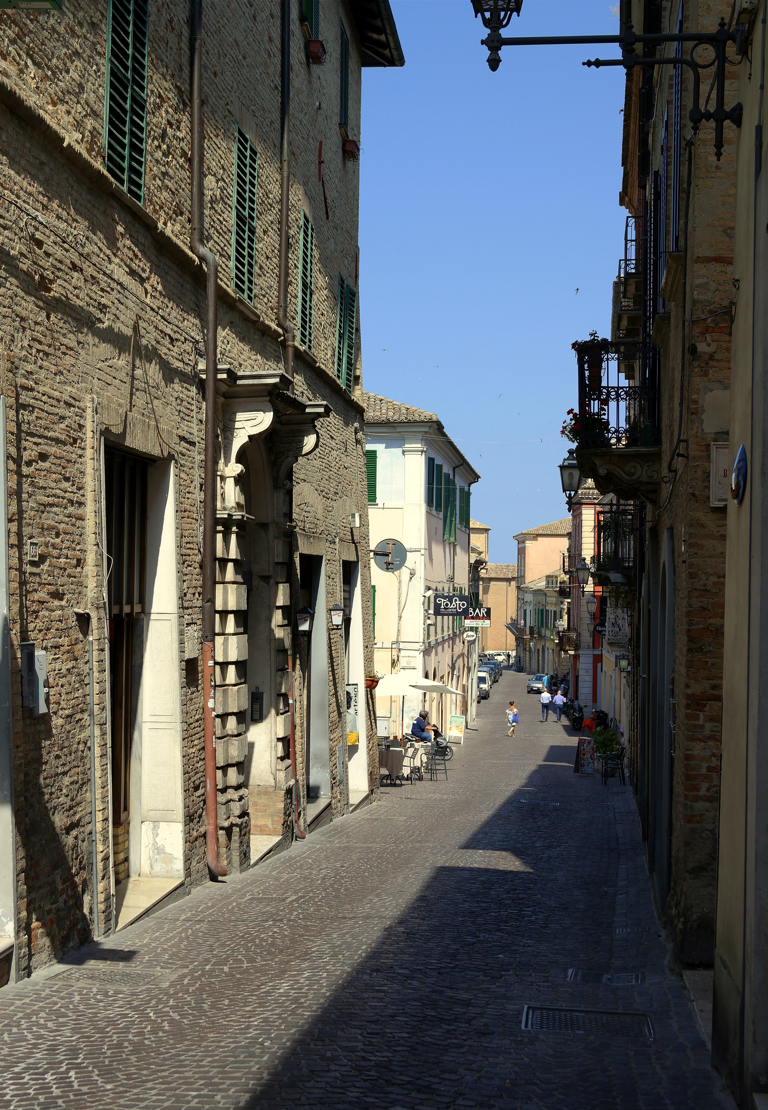 Corso Elio Adriano ad Atri